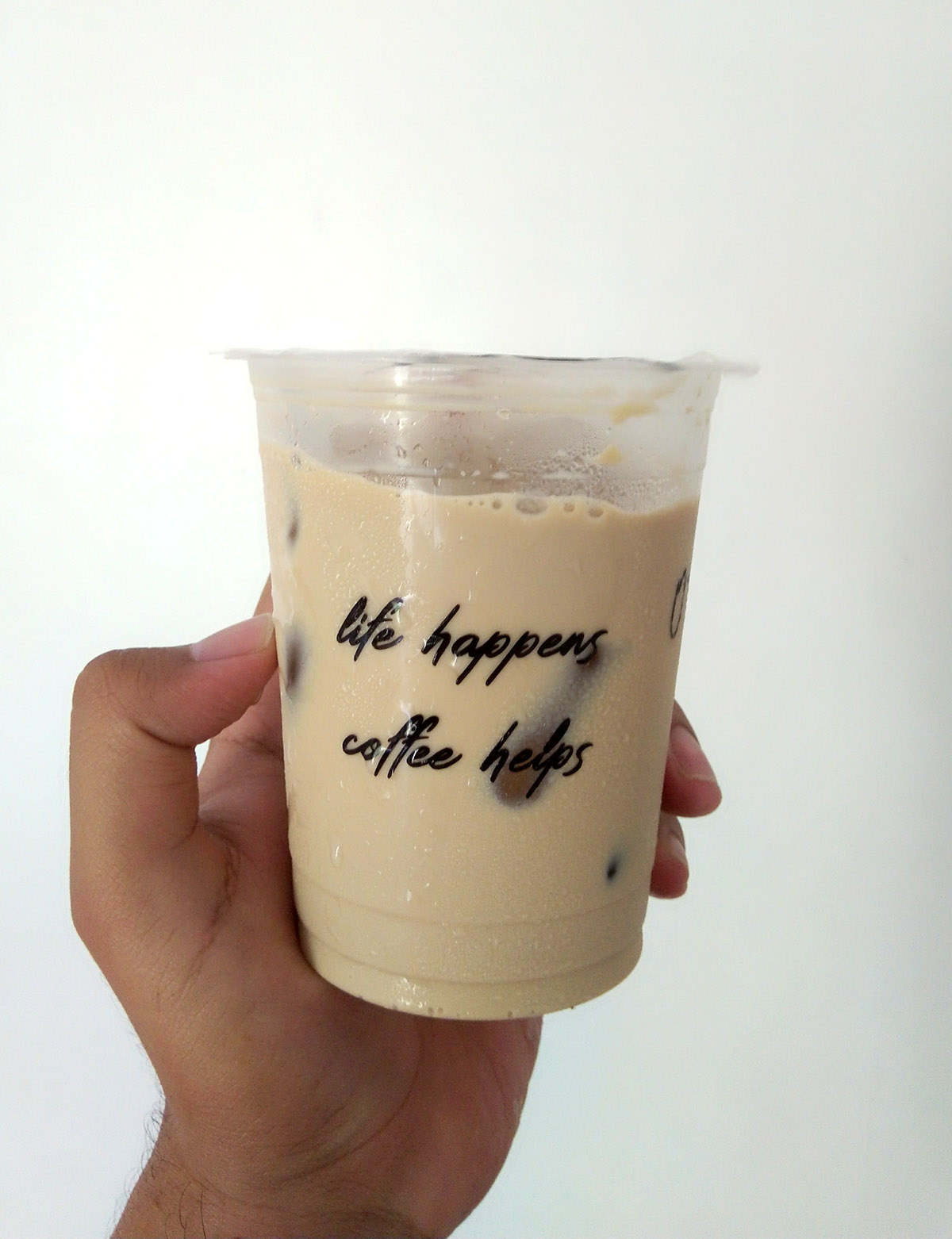 Es kopi susu kekinian di Yogyakarta, Indonesia